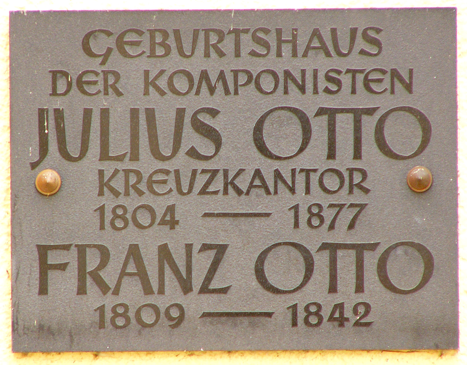 Gedenktafel am Geburtshaus von Ernst Julius und Franz Otto in der Pirnaerstr. 8 in Königstein (Sächsische Schweiz)